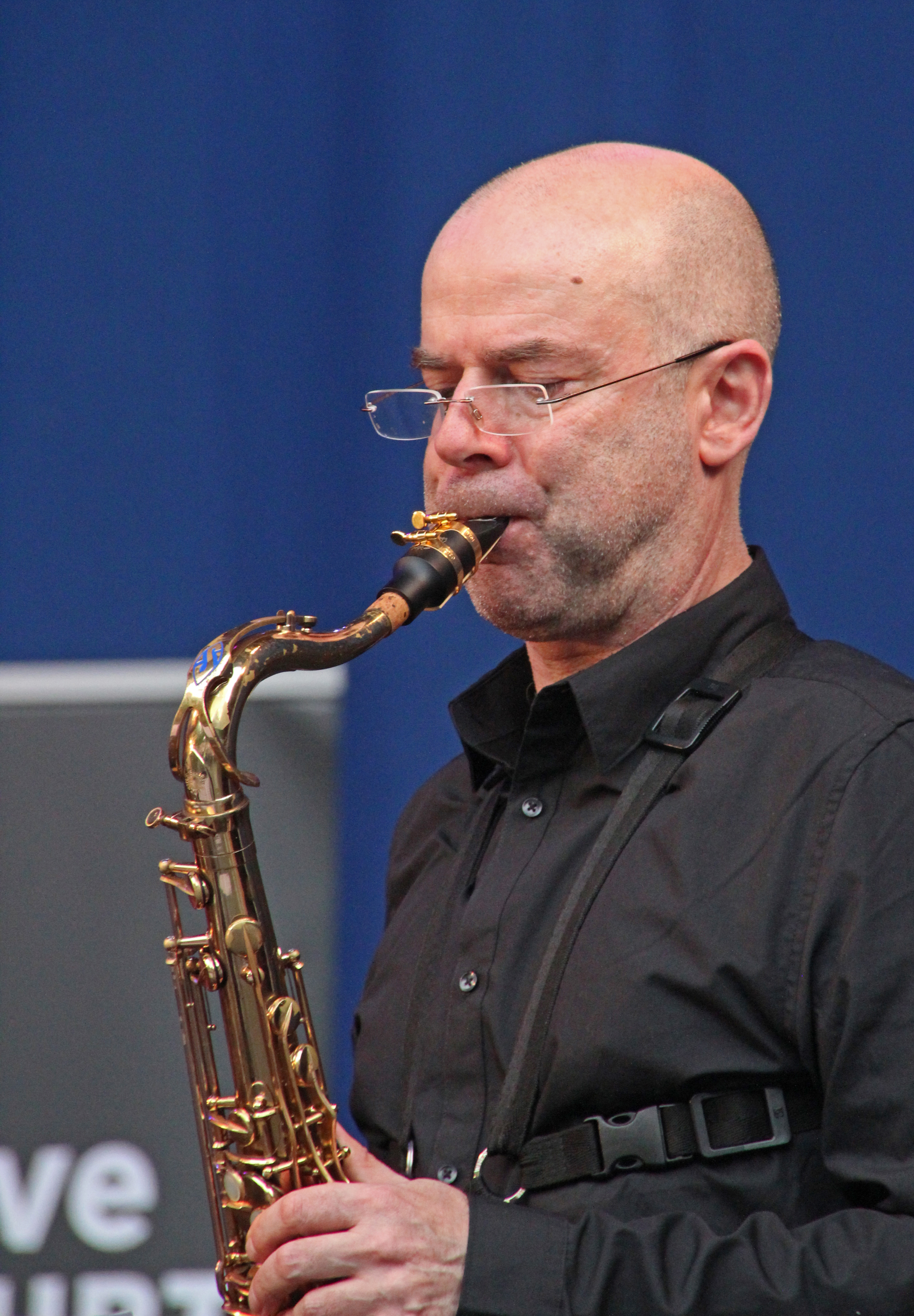 Bildinhalt: Andreas Spannagel bei einem Auftritt mit Thärichens Tentett im Palmengarten Aufnahmeort: Frankfurt am Main, Deutschland Die dargestellte Person wurde bei einem öffentlichen Auftritt fotografiert.